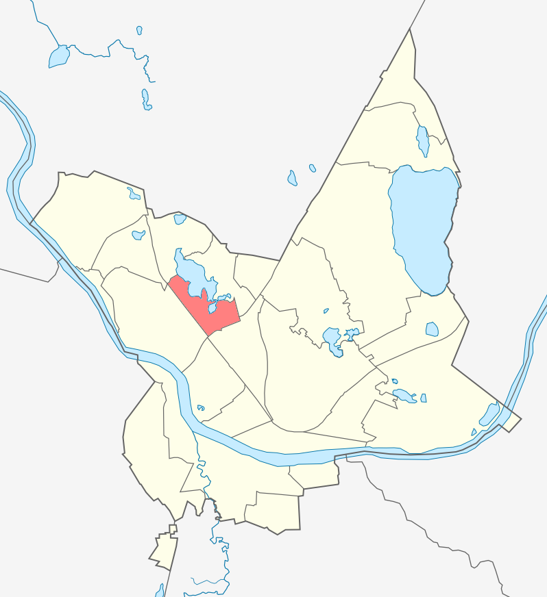 Микрорайон Эзермала карте Даугавпилса.